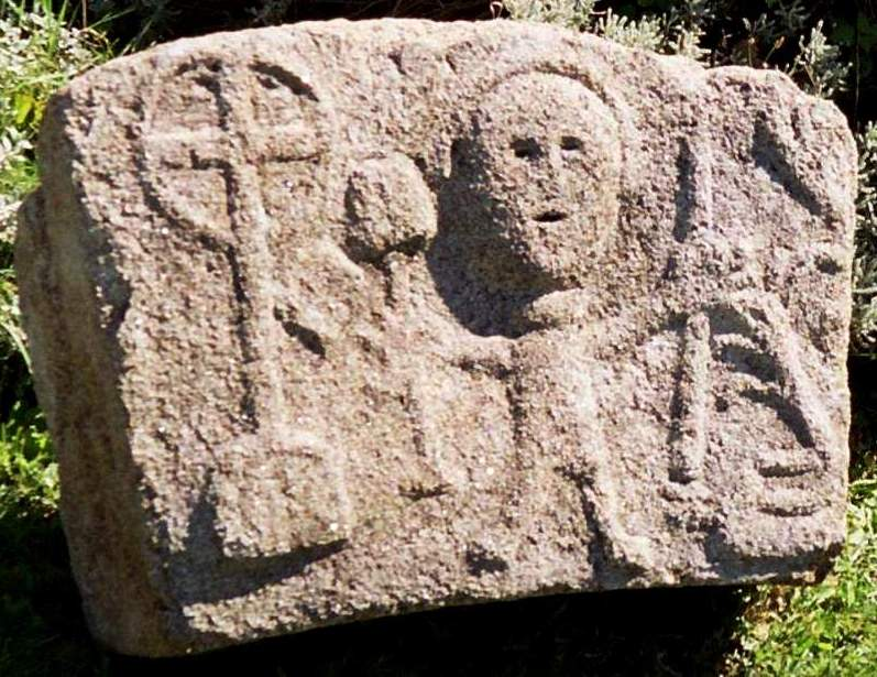 sculpture de sucellos (10ème siècle) à Comiac (Lot).